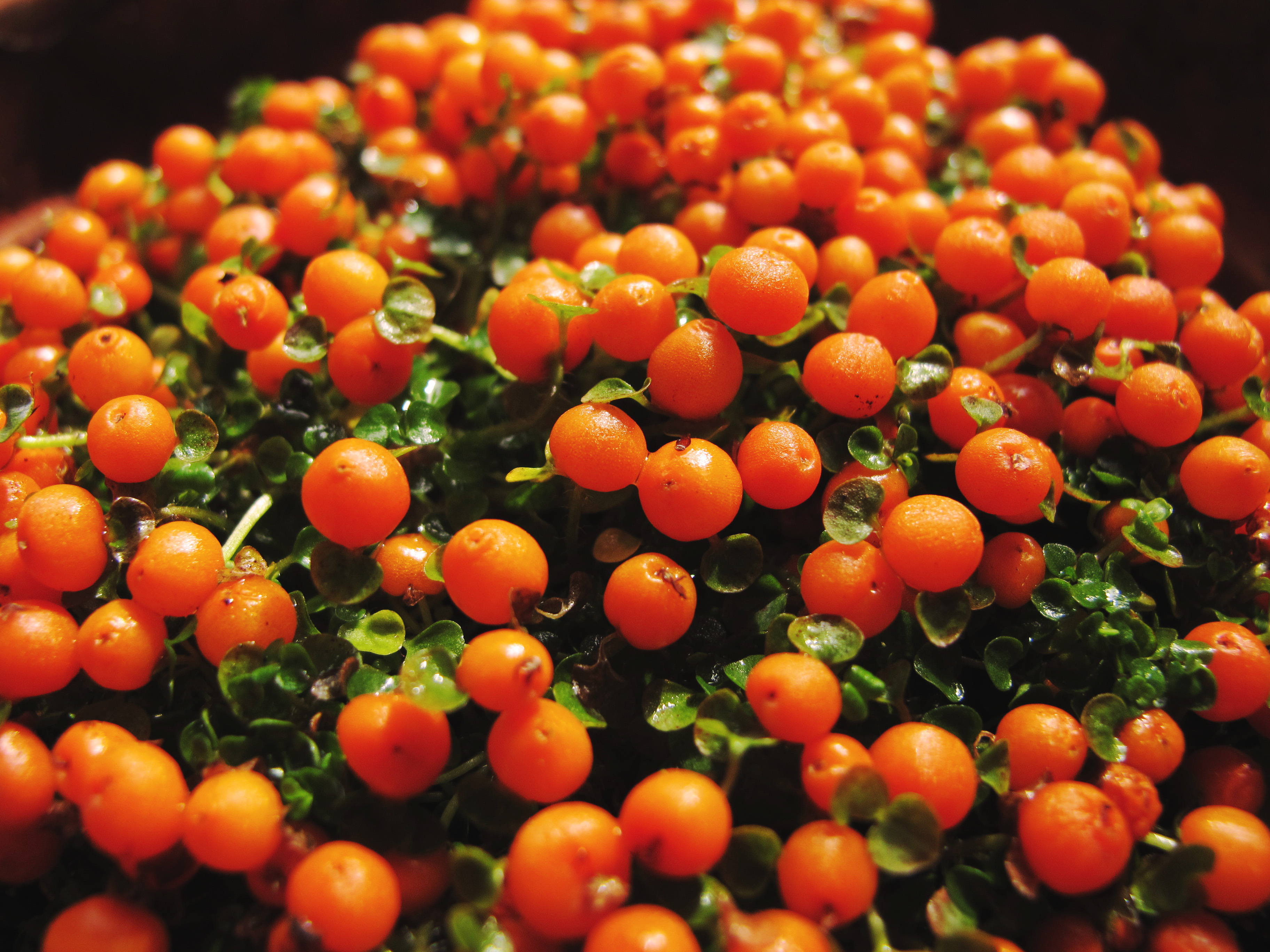 La Nertera es una planta de porte rastrero que apenas se levanta 10 cm del suelo y tiende a crecer a lo ancho, cubriendo poco a poco la superficie de la tierra donde se ha plantado. Flores estrelladas diminutas en primavera seguidas de multitud de bayas redondas y brillantes de color naranja, coral o amarillo. Cuando la planta está sin bayas se puede confundir con la Soleirolia ya que ambas presentan un crecimineto y follaje muy parecidos Resulta difícil conservar la Nertera de un año para otro